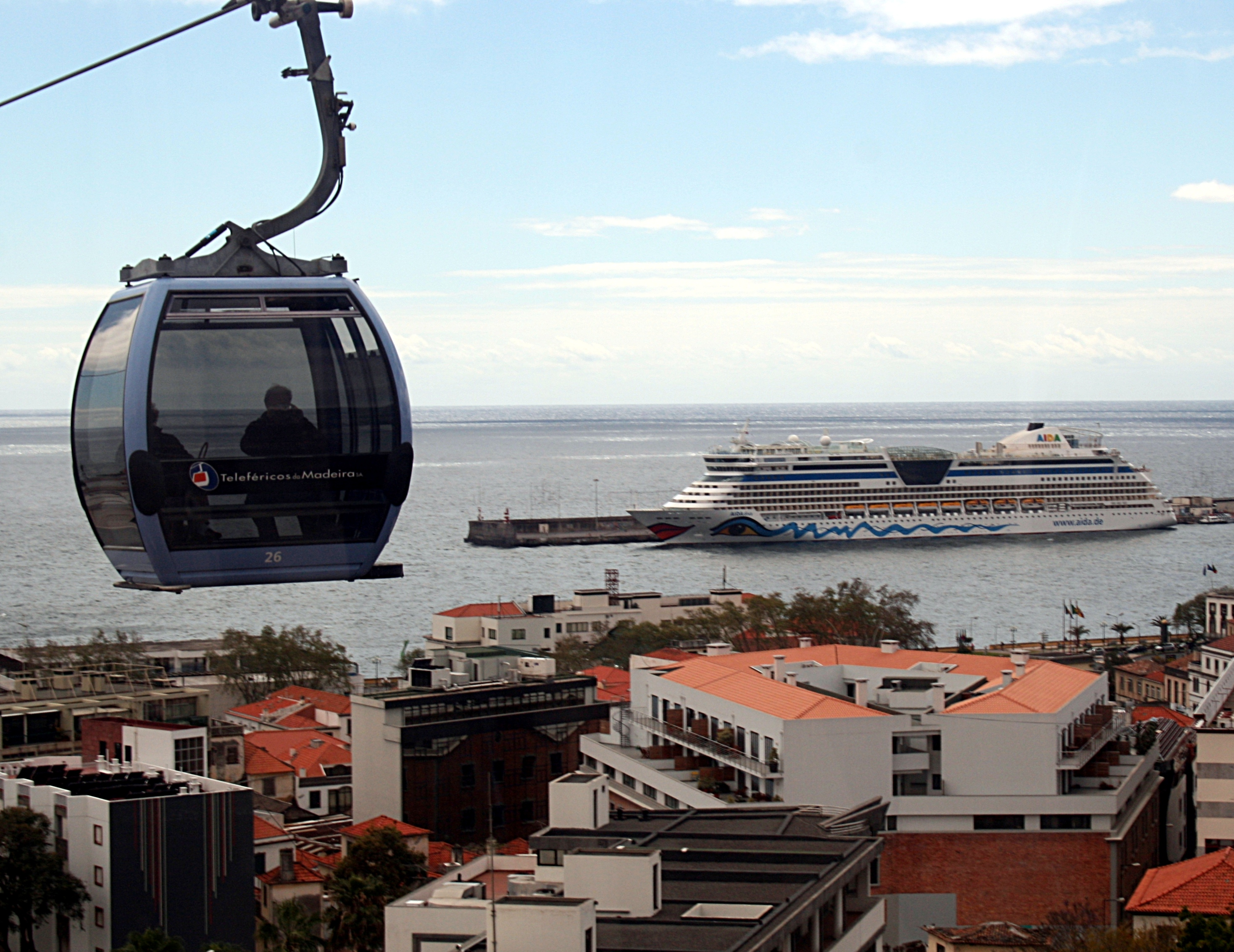 Die_AIDA_vor_Funchal